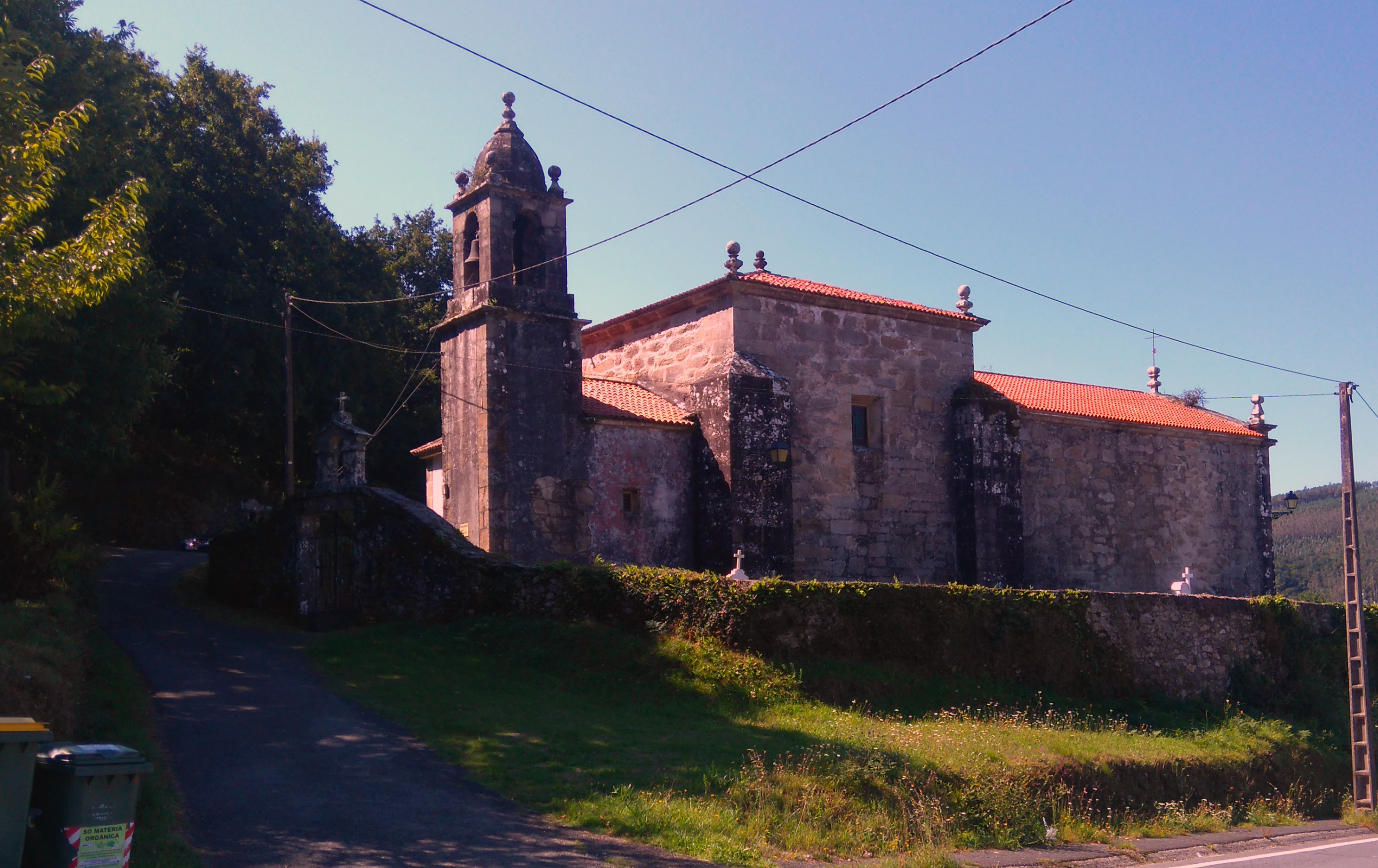 Igrexa parroquial de Vilacova, Lousame, Galicia